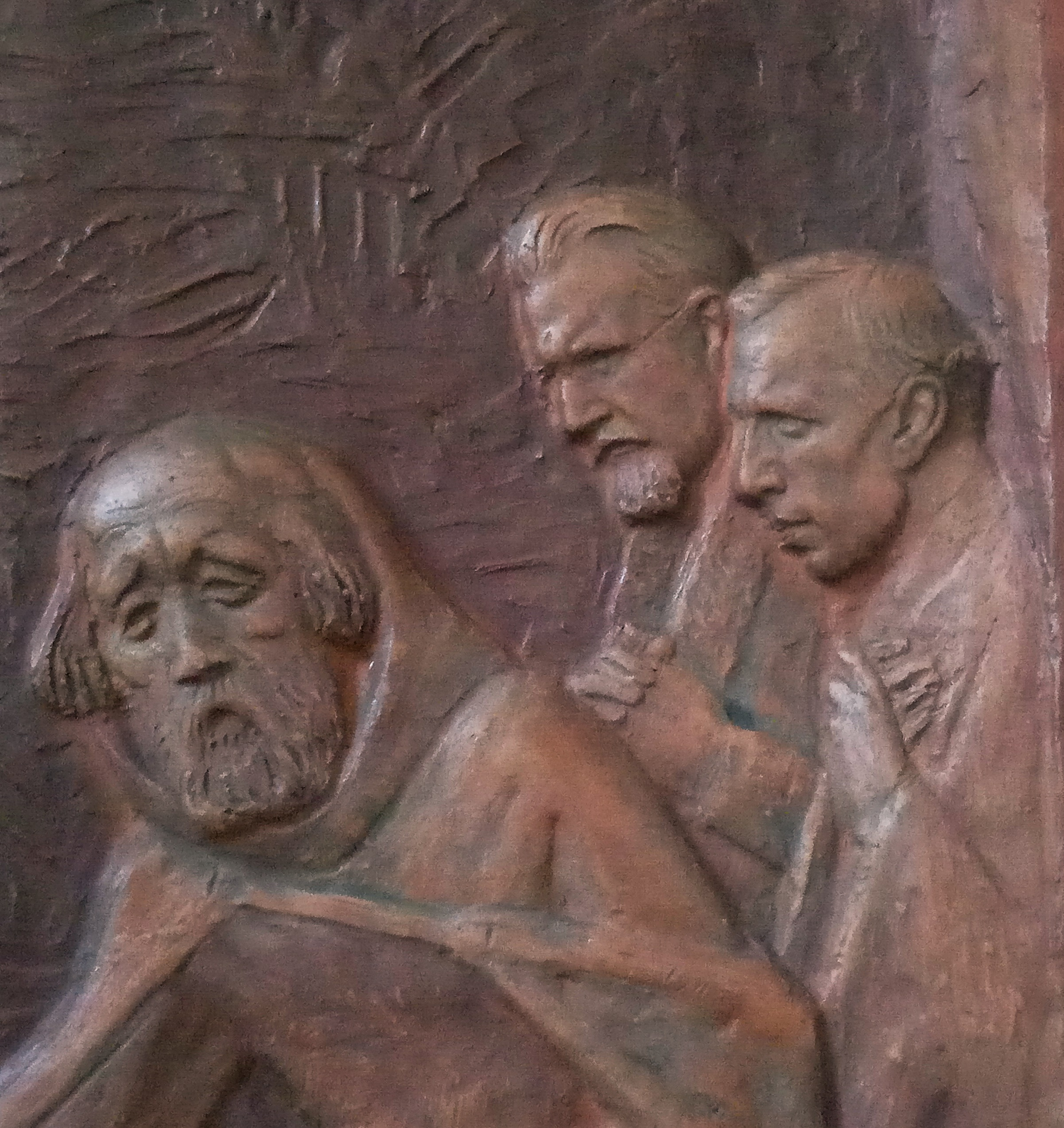 XIV. Kreuzwegstation von Professor August Weckbecker, in Schifferstadt, St. Laurentius. XIV. Station: Ganz rechts, August Weckbecker (Selbstporträt) , links daneben, der Kirchenarchitekt Albert Boßlet, dargestellt als „Zeugen“ der Grablegung Christi (1928).